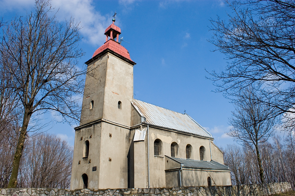 Kościół na Wzgórzu Doroty w Będzinie.